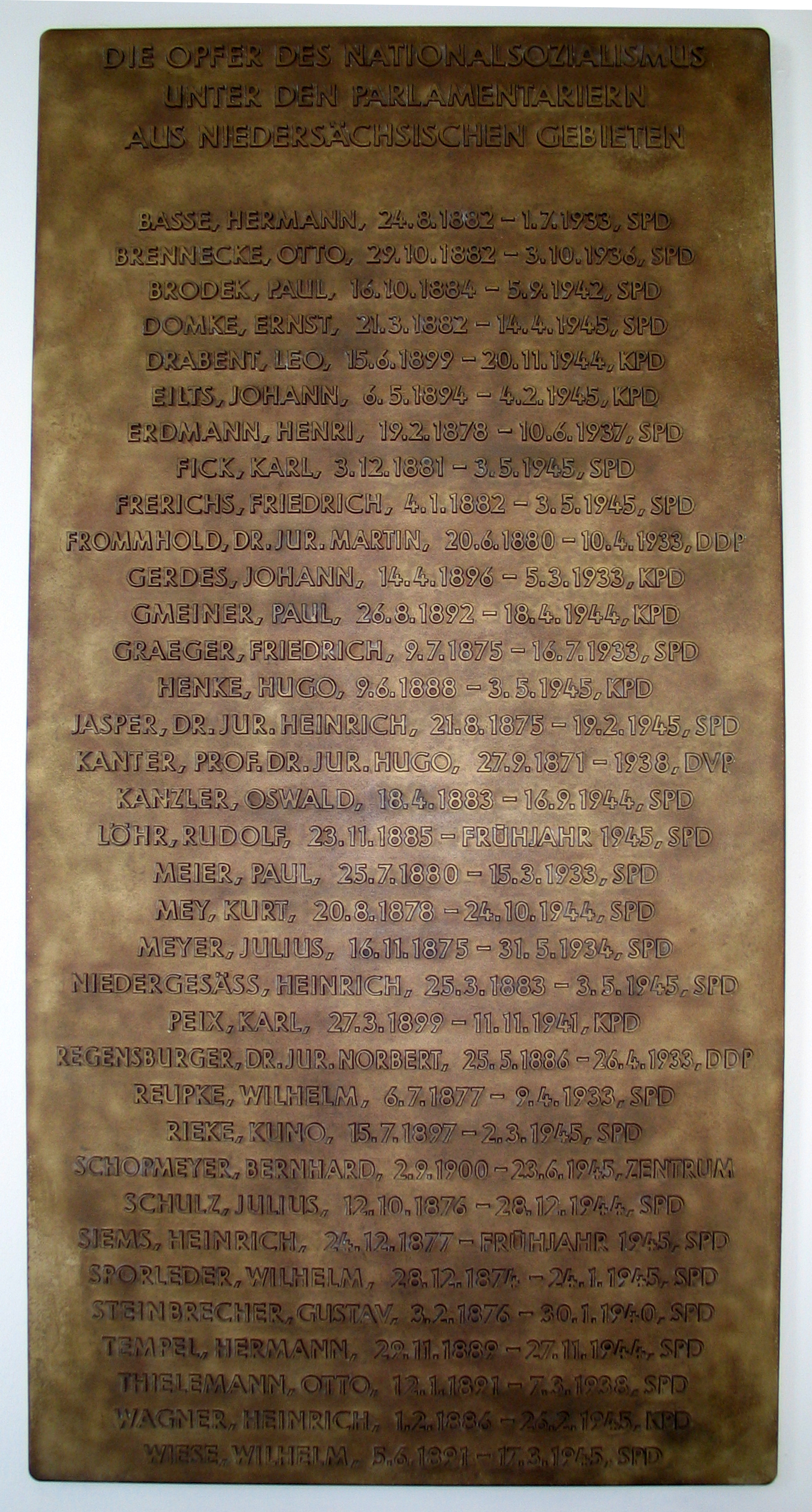 Die 2007 installierte Gedenktafel "Die Opfer des Nationalsozialismus unter den Parlamentariern aus niedersächsischen Gebieten" in der Wandelhalle vom Niedersächsischen Landtag genutzten ehemaligen Leineschlosses in Hannover erinnert an 35 ums Leben gekommene, demokratisch gewählte Parlamentarier, die Opfer des Nationalsozialismus wurden.